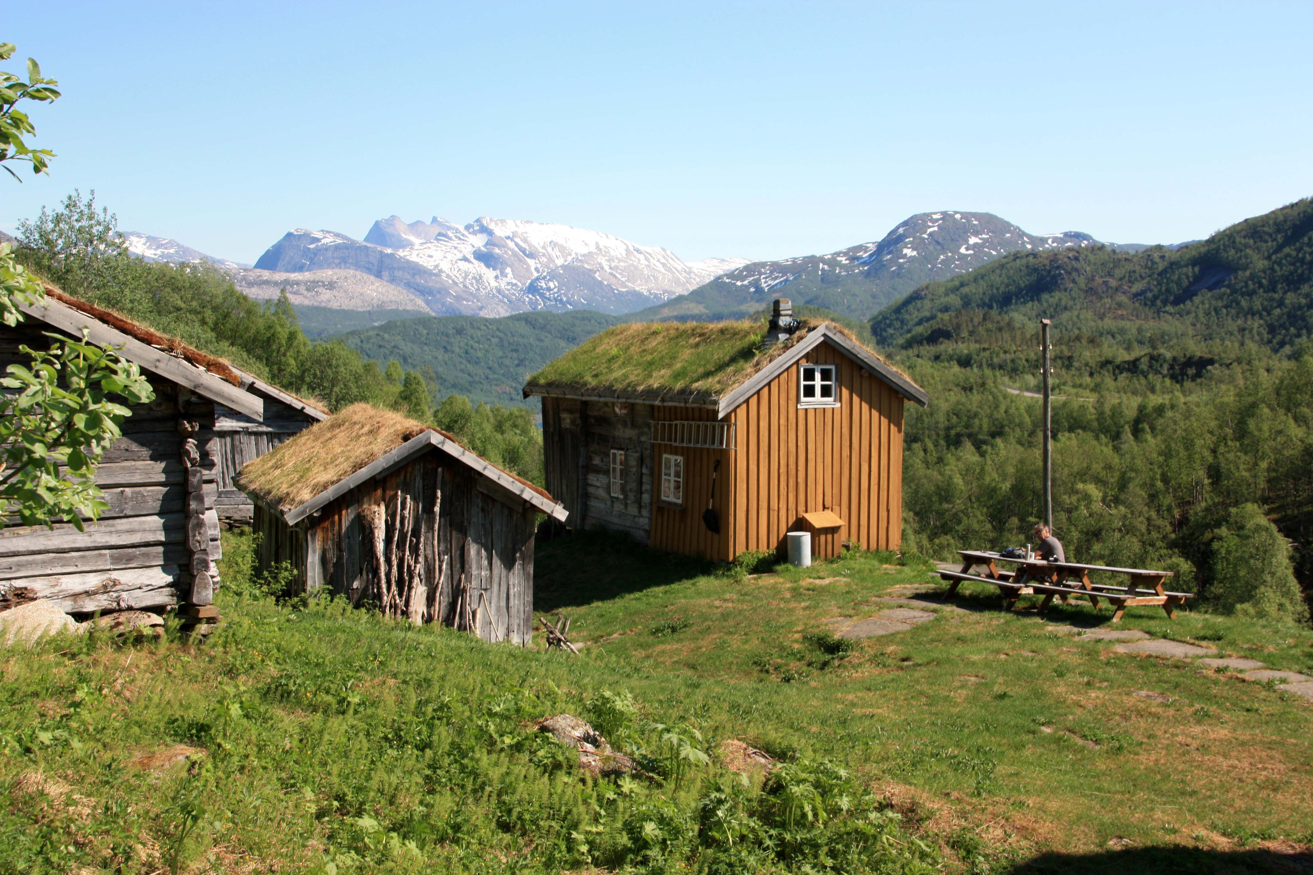 Noen av husene på husmannsplassen Kjelvik i Sørfold kommune, Nordland.